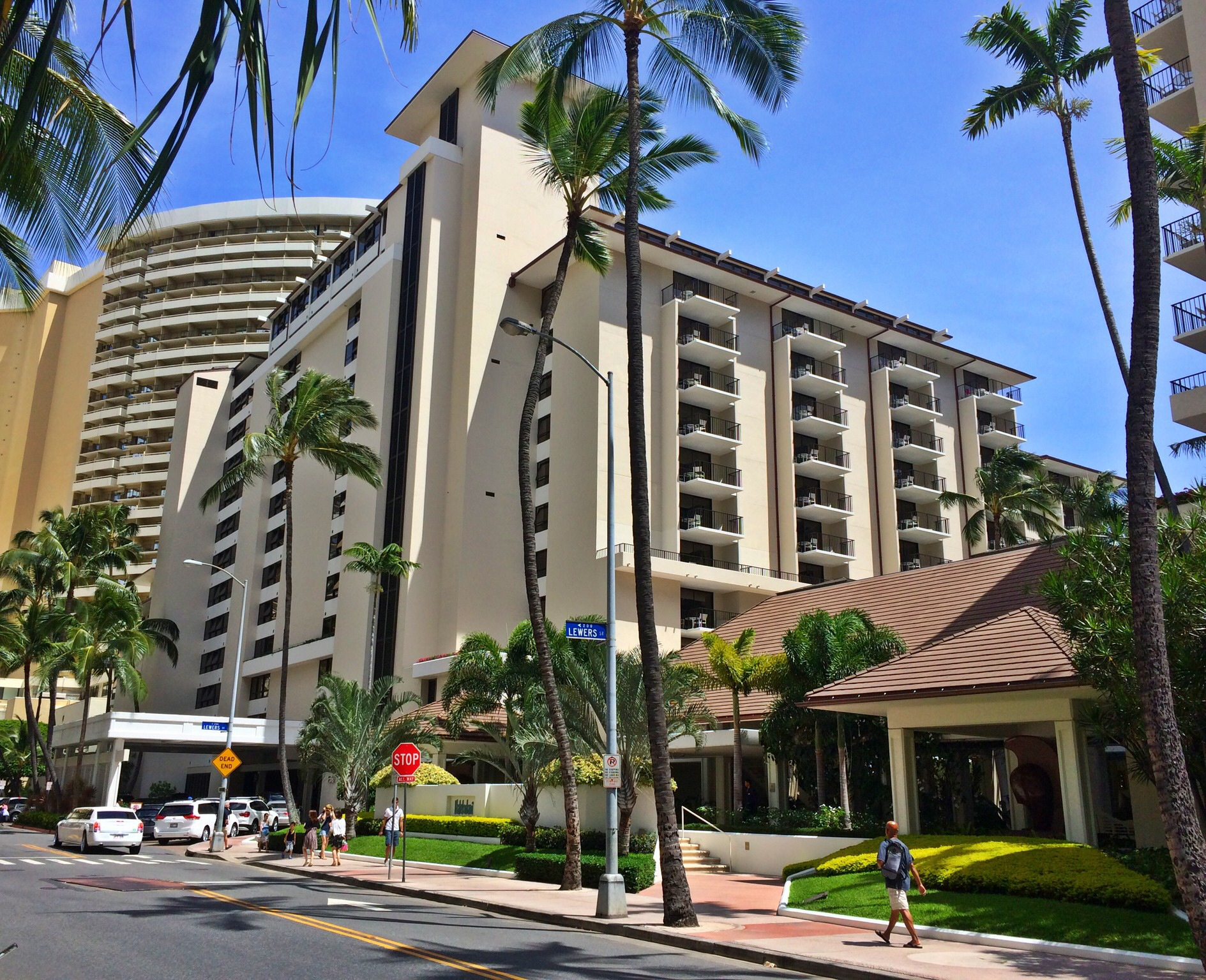 Street View of Halekulani Hotel